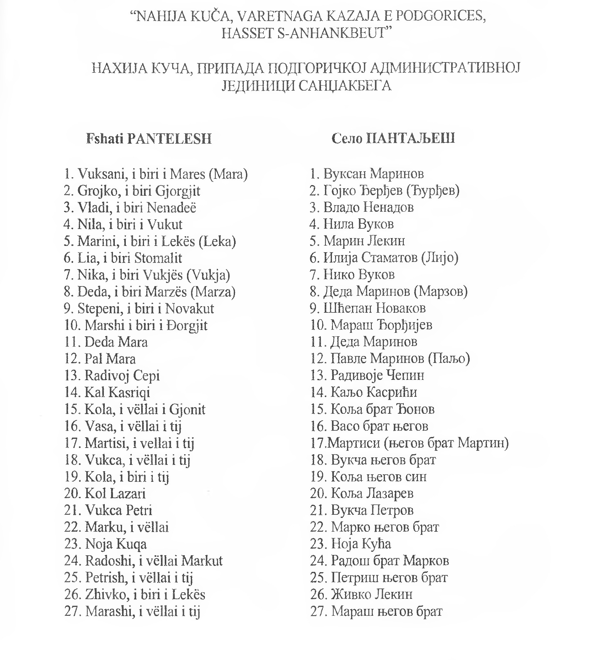 Страница Дефтера Скадарског Санџакбега из 1485.године